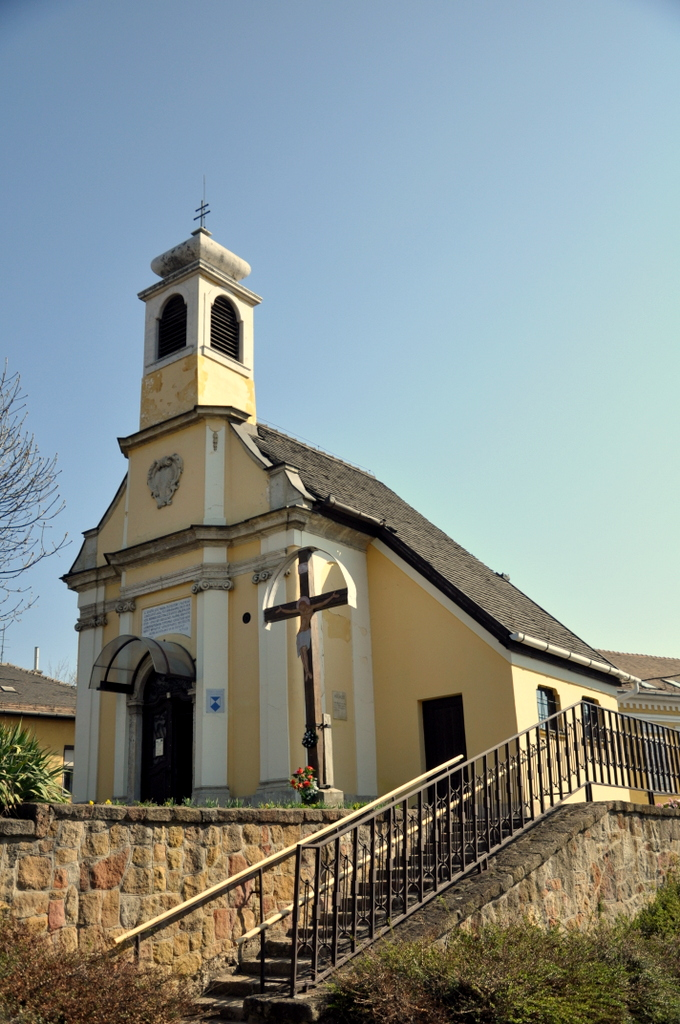 Conti chapel in Budapest District X This is a photo of a monument in Hungary, Identifier: 1081